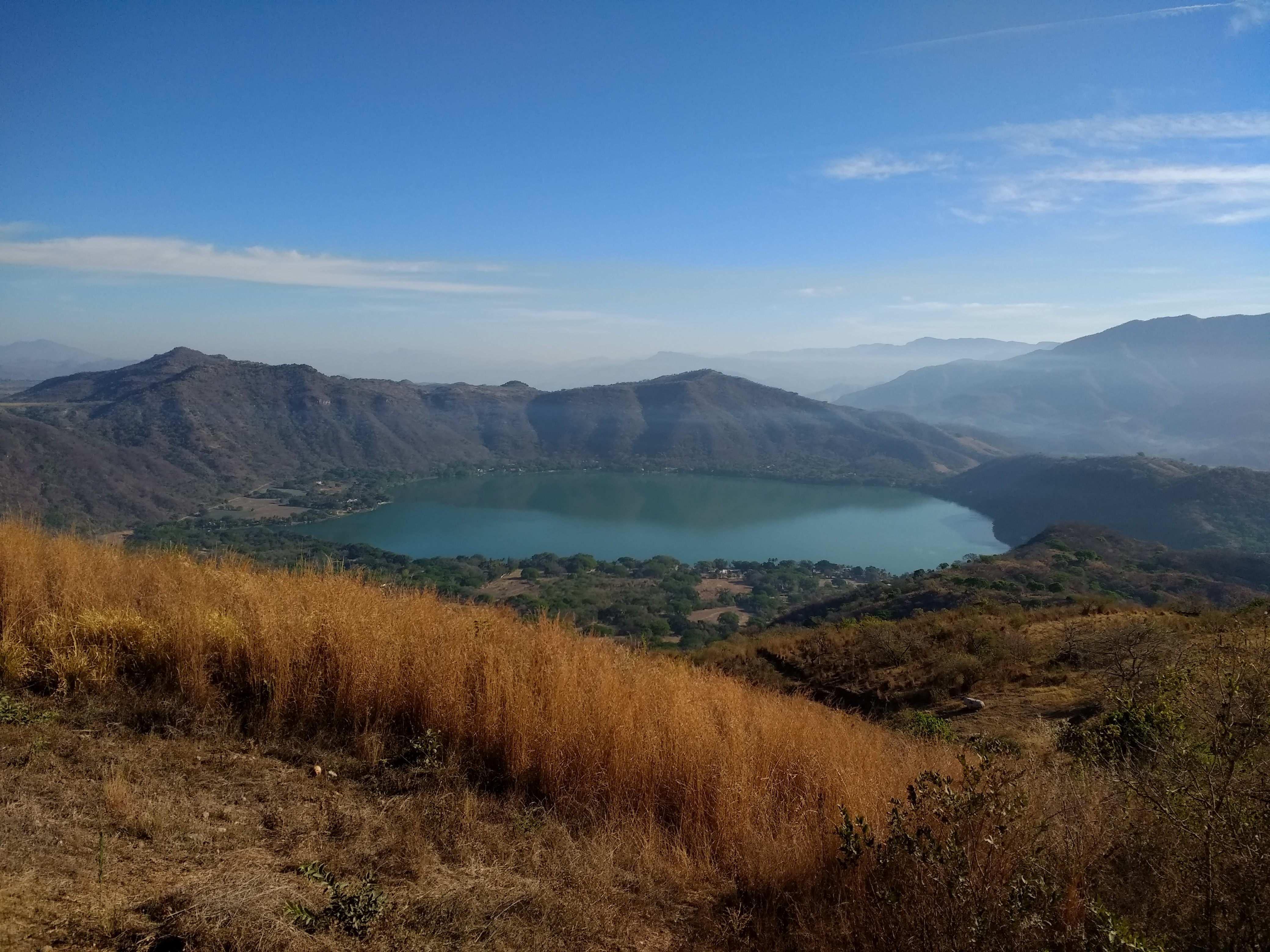 Vista del mirador del lago cráter